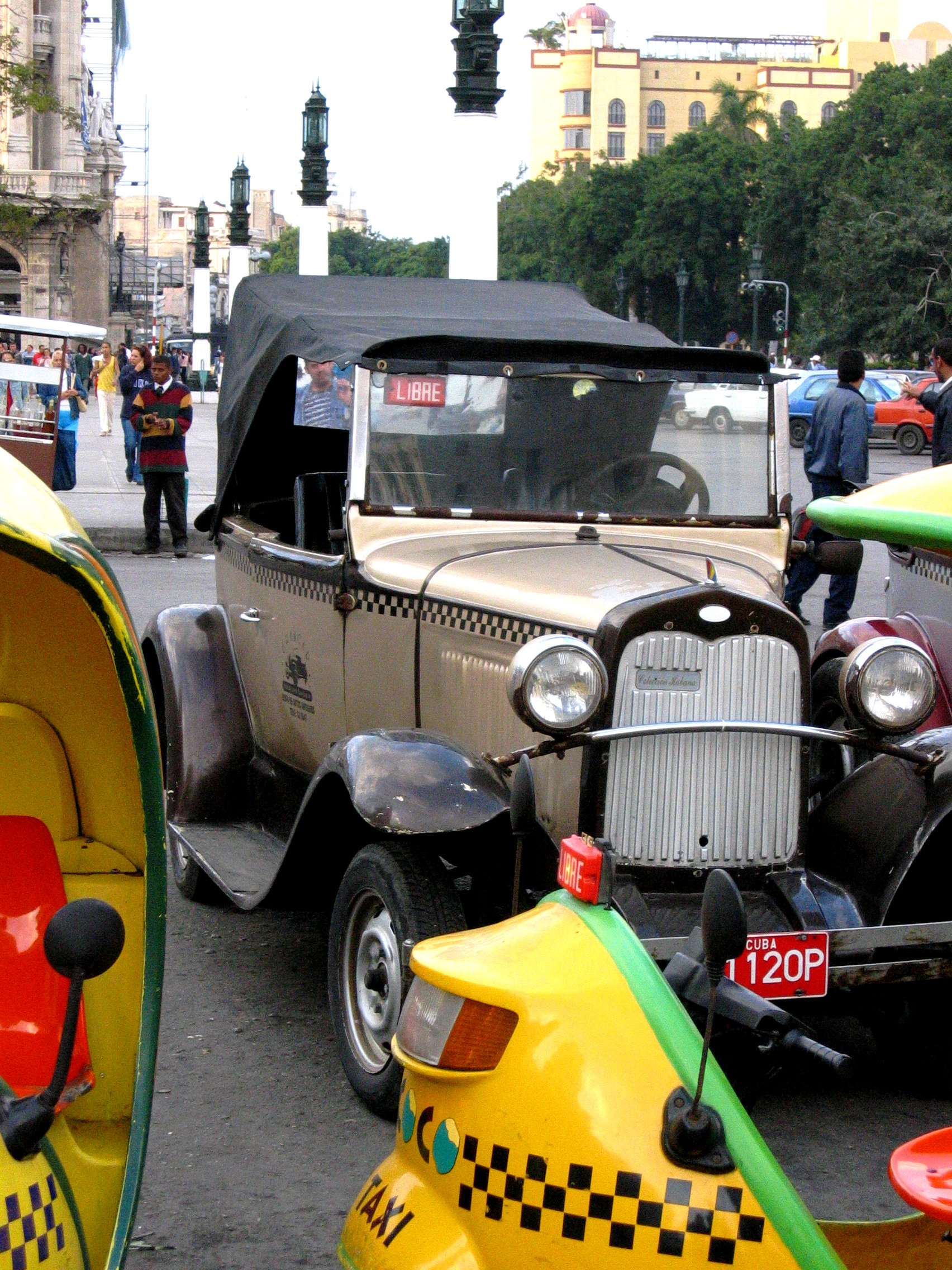 Takso Kuubal, mustvalge ruudutriip küljel, ees tuuleklaasil punane silt, mis teatab, et sõiduvahend on vaba teenust osutama.